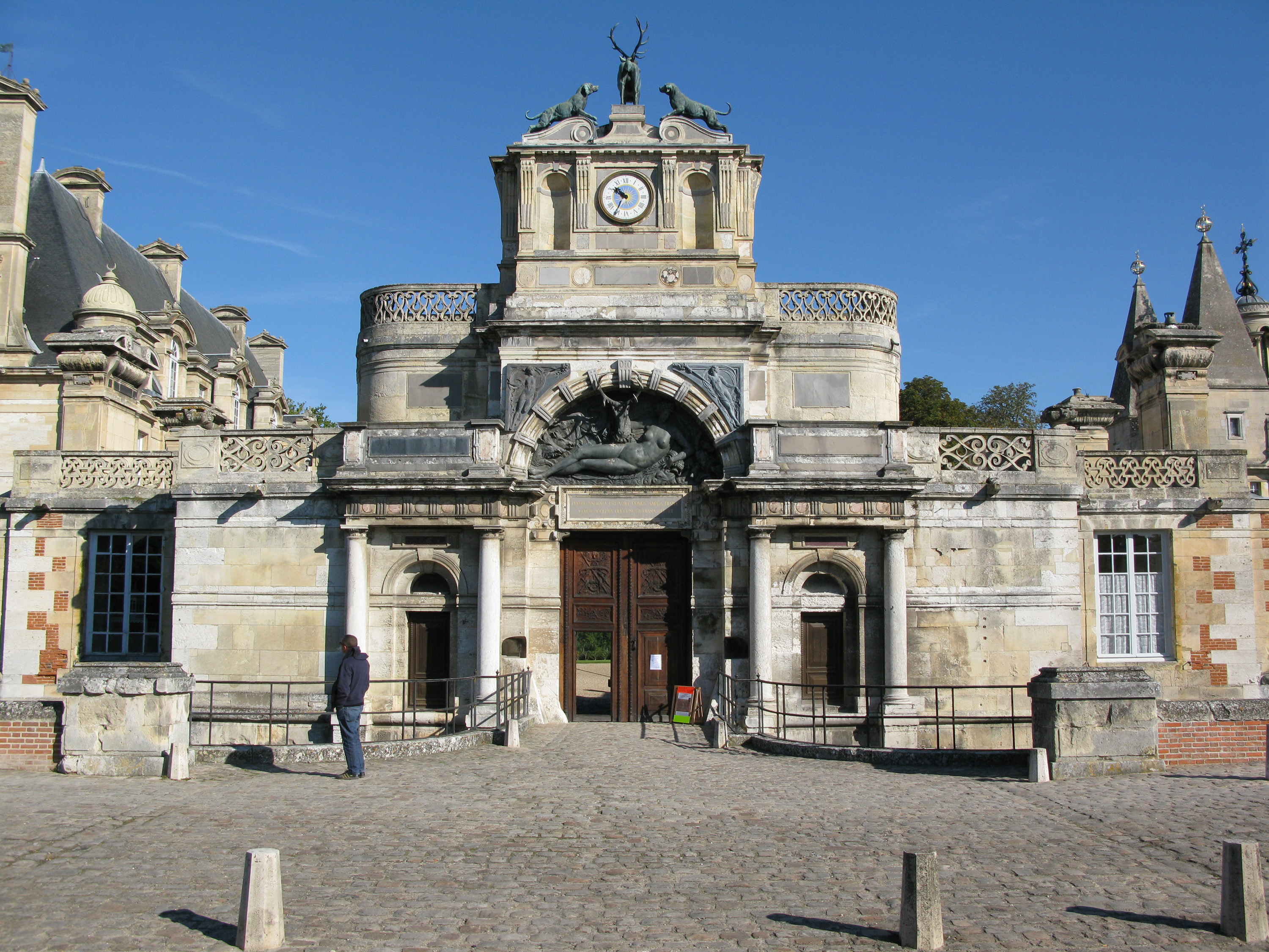 Le château d'Anet est un château Renaissance, situé en Eure-et-Loir, France Le château construit pour Diane de Poitiers par Philibert de l'Orme